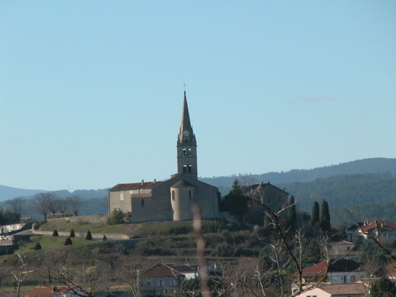 Laurent Boyer Lablachère Hiver 2005